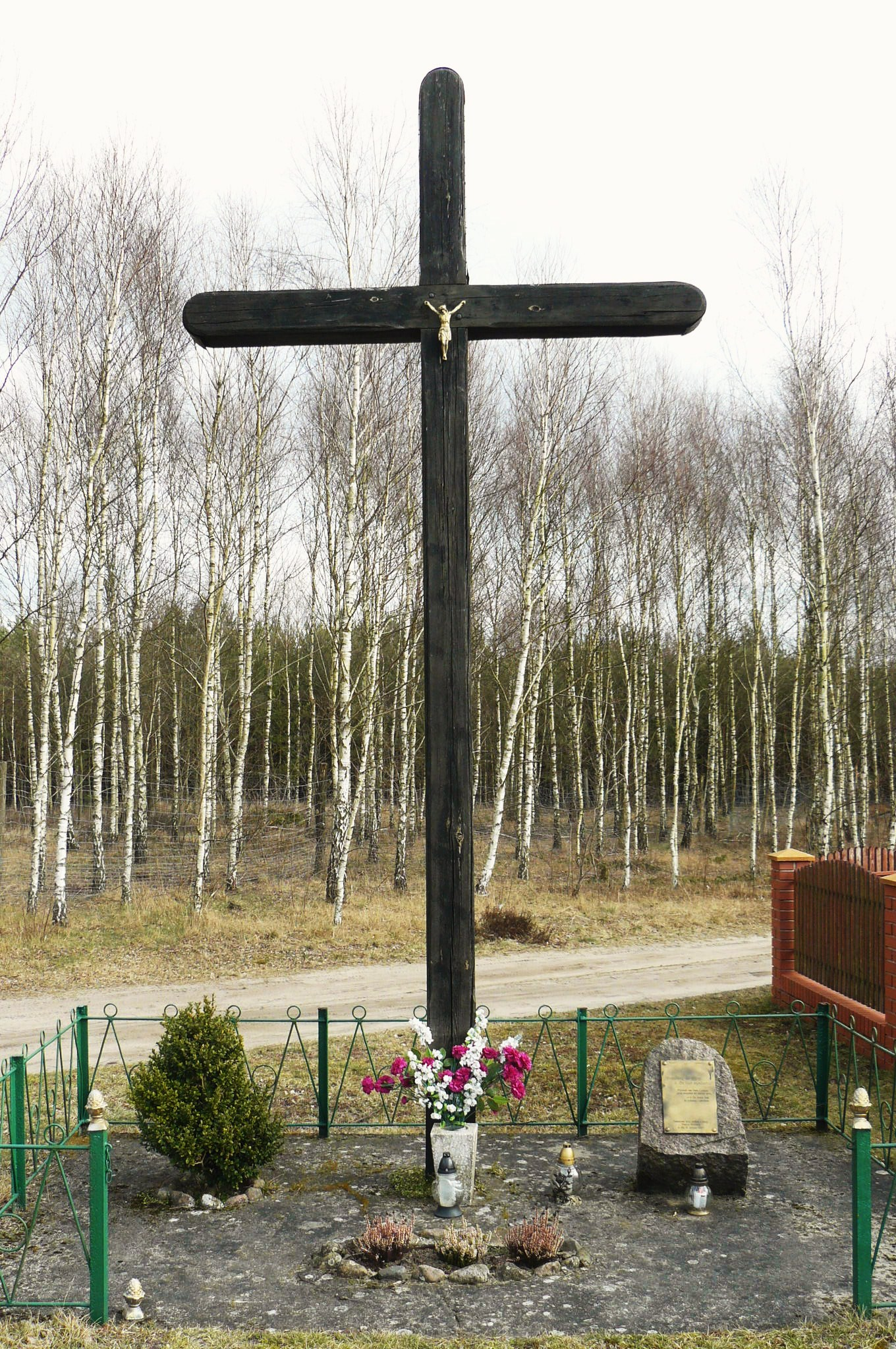 Miały - krzyż ocalały z wielkiego pożaru Puszczy Noteckiej w 1992r.